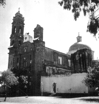 Vista lateral de la Parroquia de Santa Inés